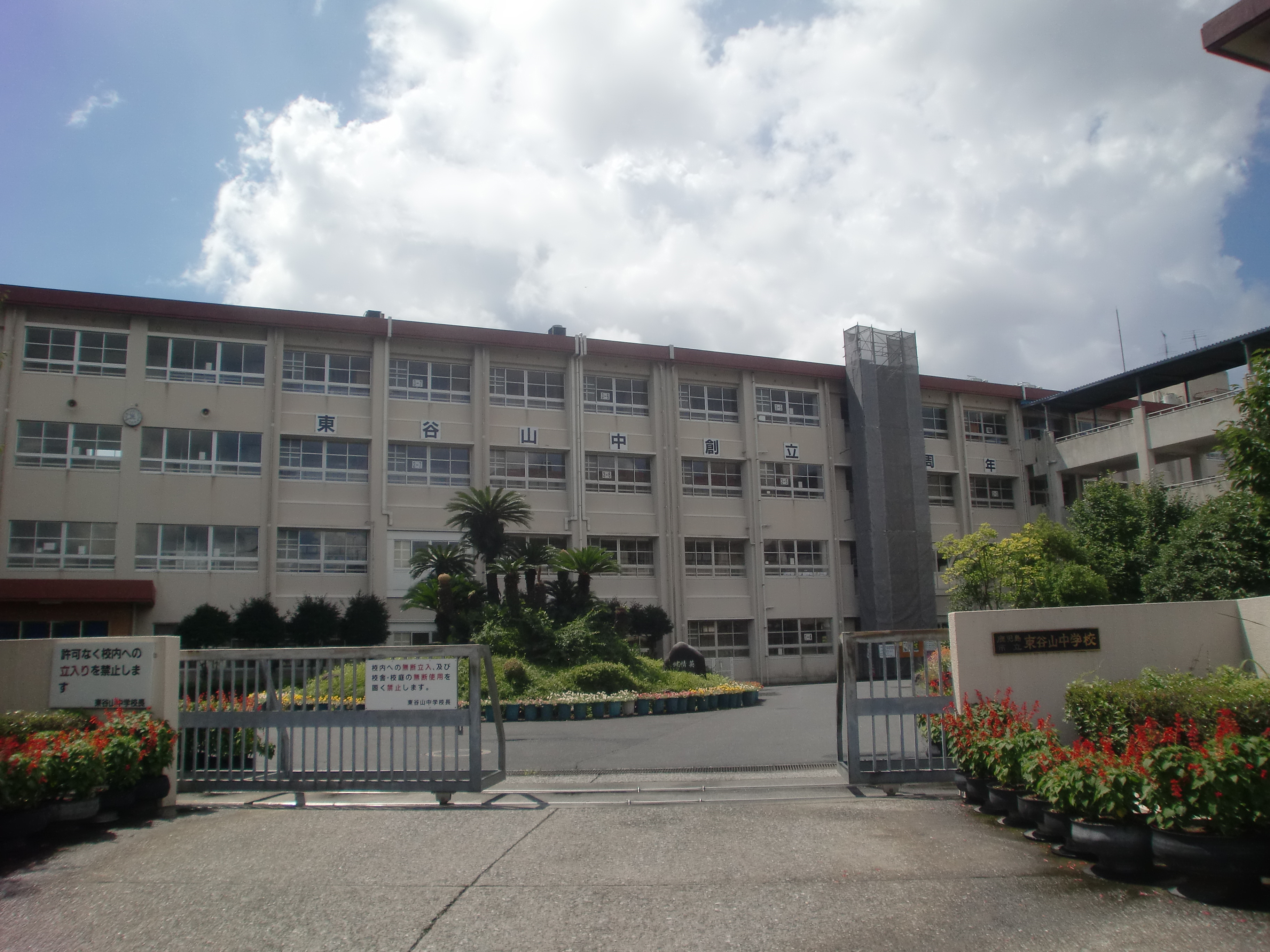 鹿児島市立東谷山中学校の外観。